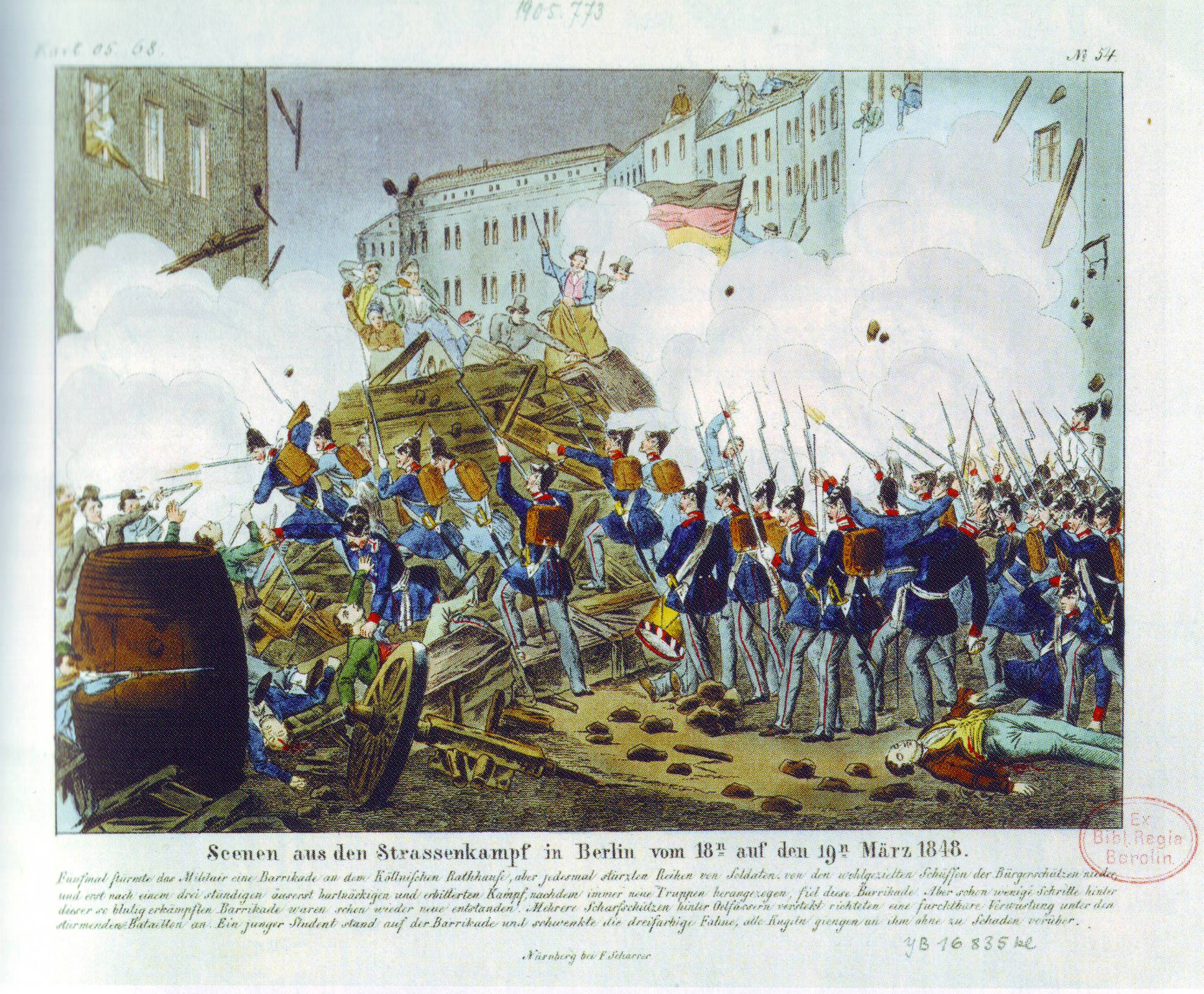 Kolorierte Lithographie. Nürnberg, 1848. “Scenen aus dem Strassenkampf in Berlin vom 18n auf den 19n März 1848”